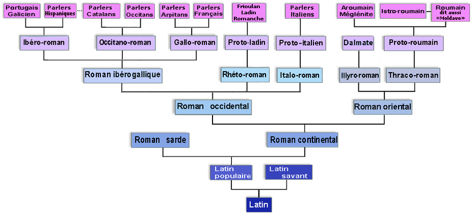 Schema des langues romanes